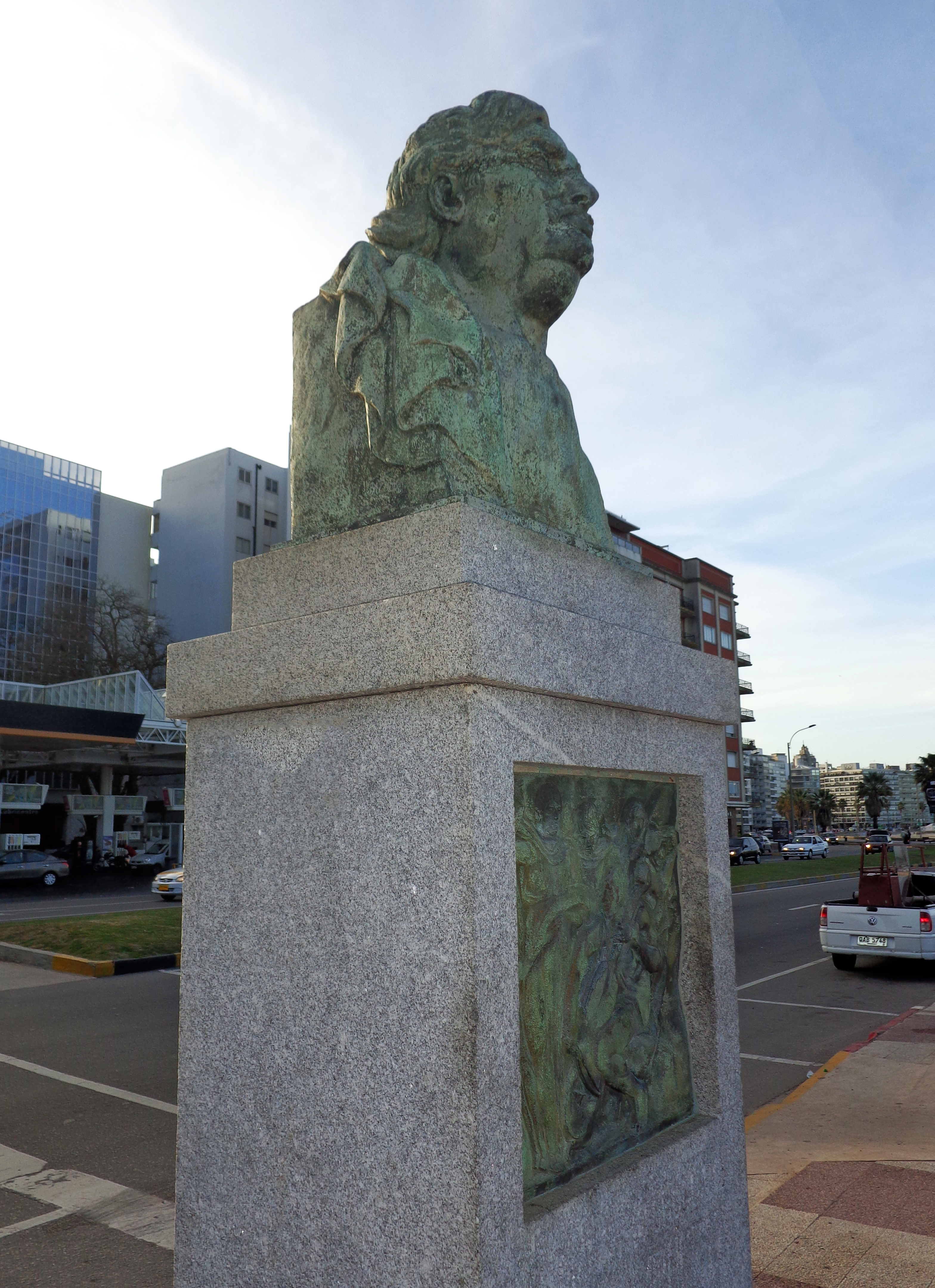 Luis Nicolás Sambucetti. Ubicada en el departamento de Montevideo